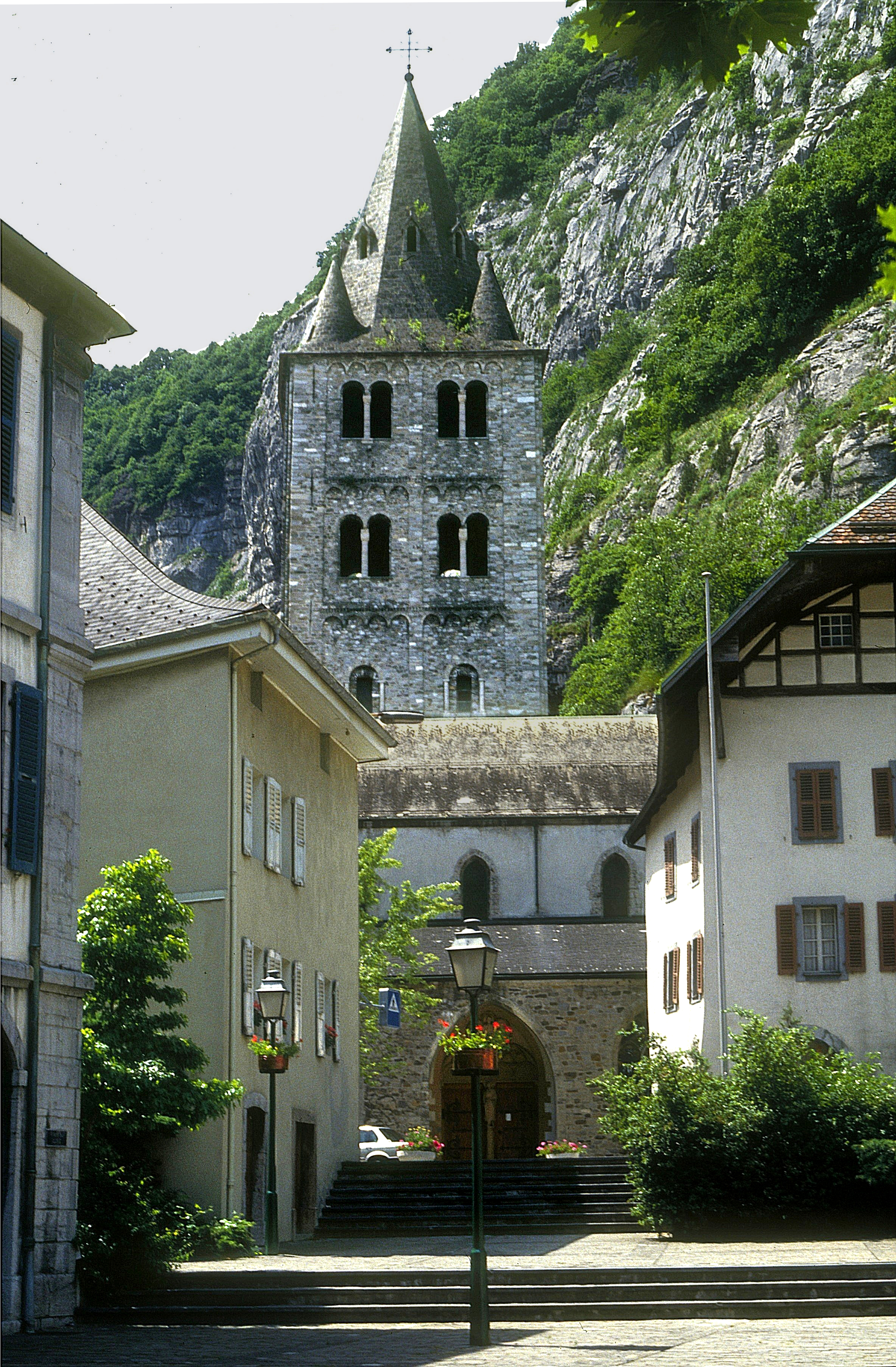 Bildbeschreibung: Saint-Maurice - Blick auf die Abteikirche Quelle: Spurzem Fotograf: Lothar Spurzem Datum: 03.06.1990